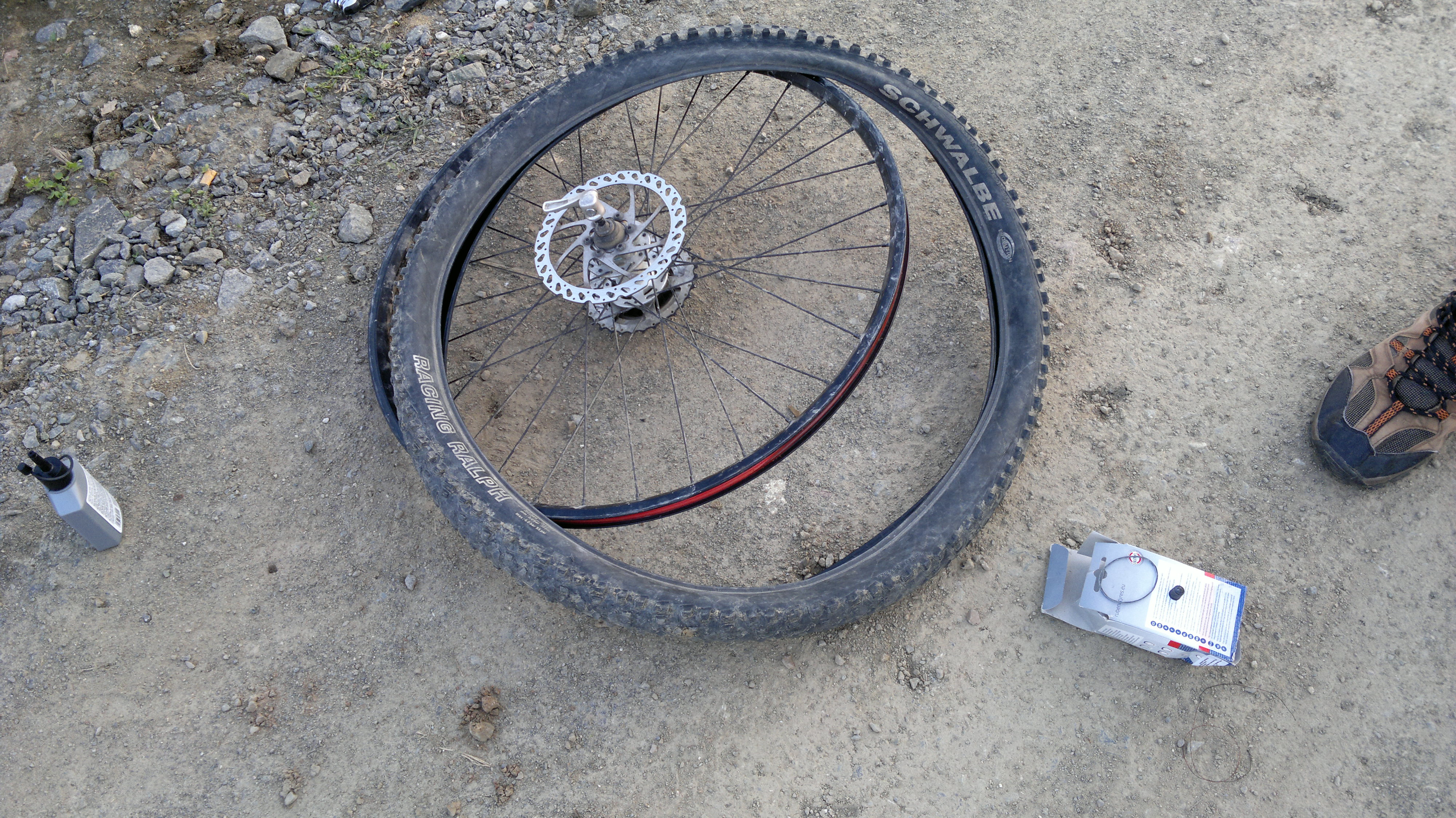 34000, Ćosine Laze, Croatia